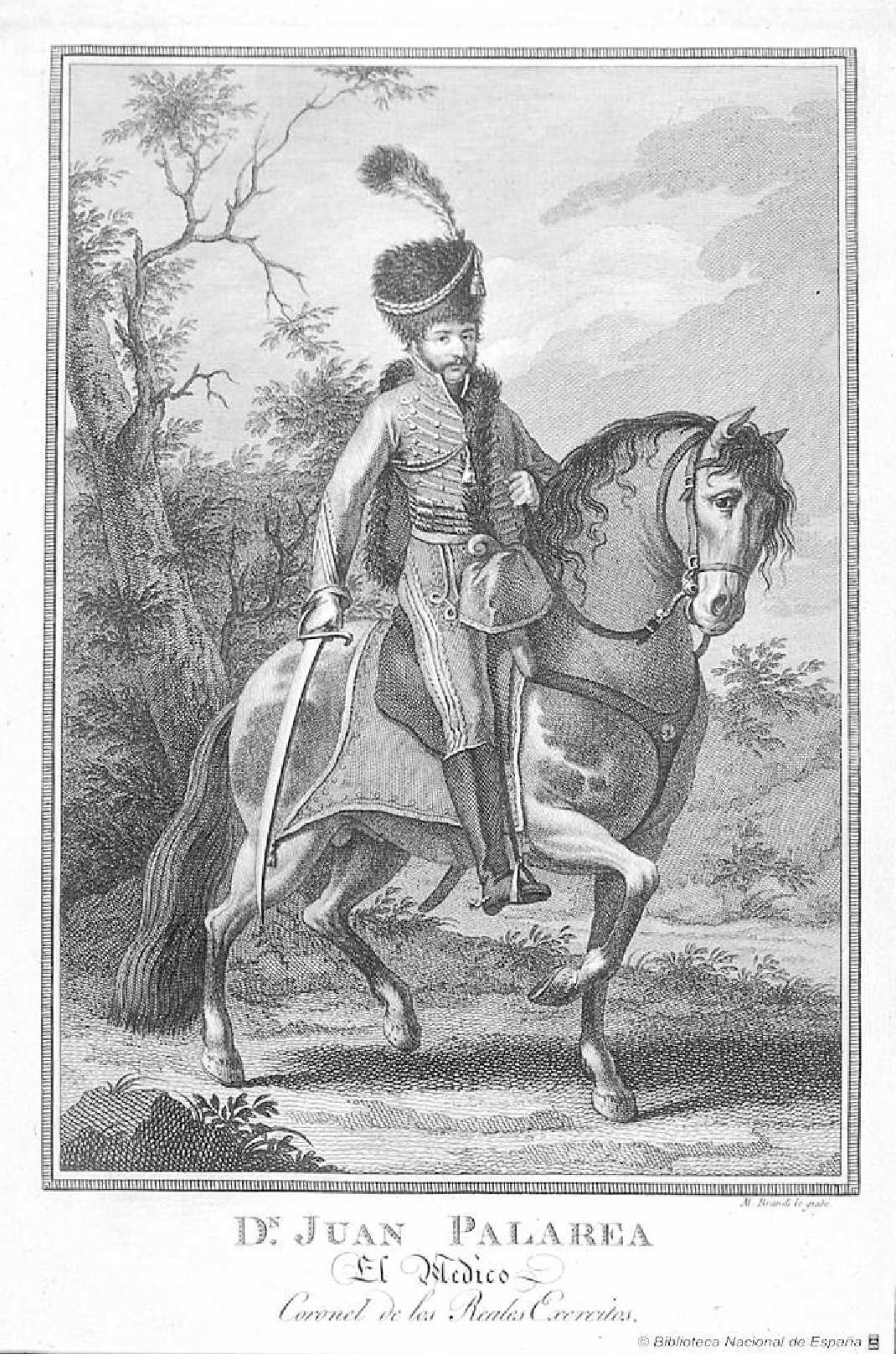 Retrato de Juan Palarea, Aguafuerte y buril de Mariano Brandi. Inscripción: D.N JUAN PALAREA / El Medico / Coronel de los Reales Exercitos.